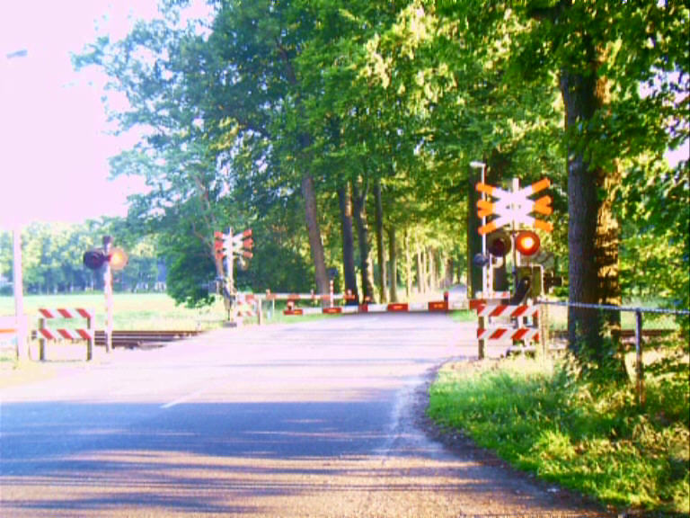 Bahnübergang in den Niederlanden (Standort: Heino nahe Zwolle)